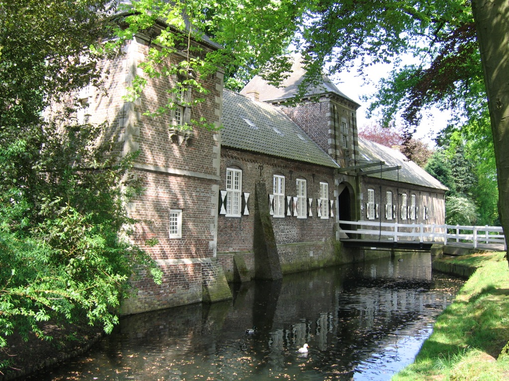 Foto van het kasteel te gemert gemaakt door Wieger van der Burgt